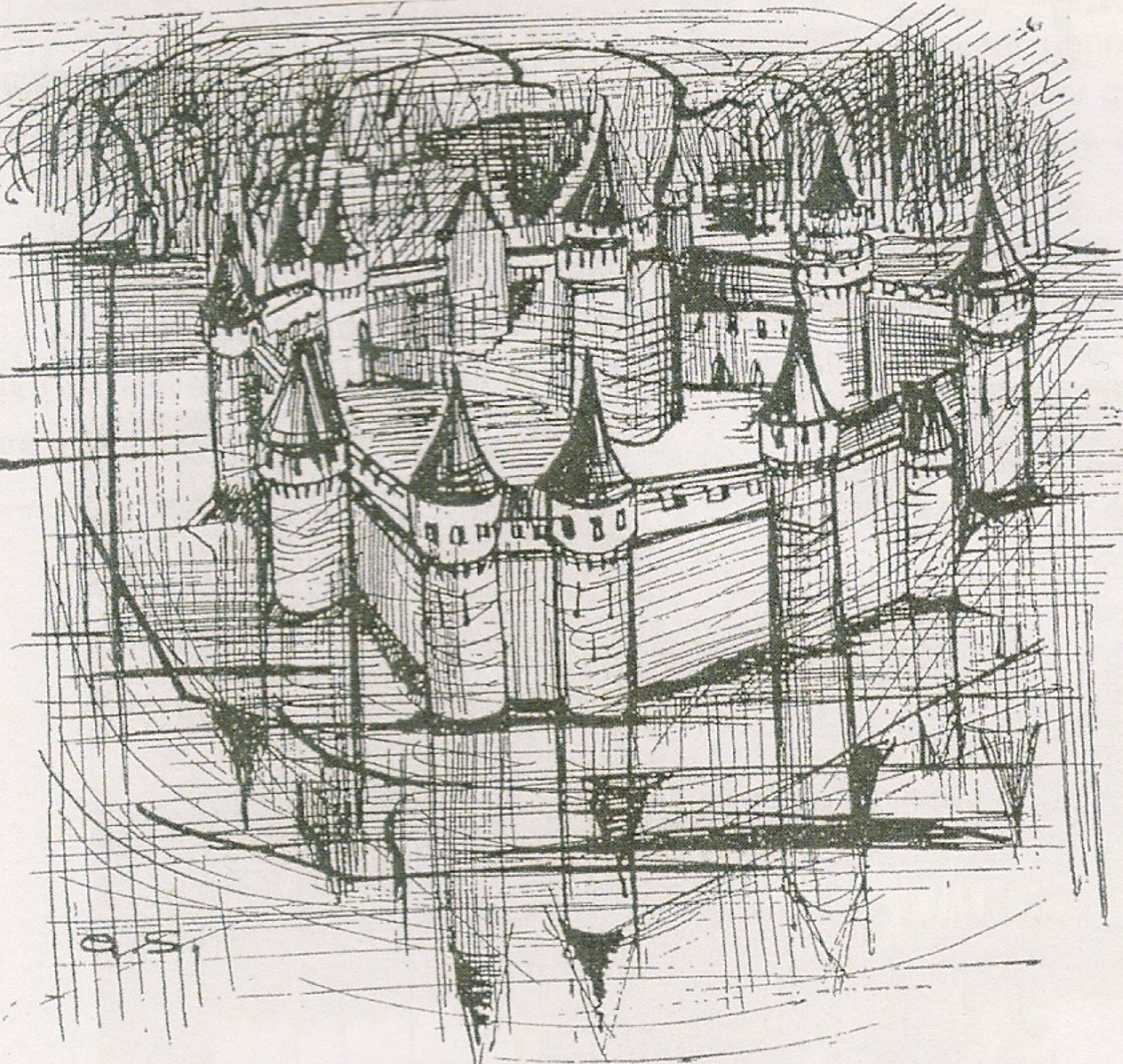 Dessin du château de Messei (Orne) d'après les descriptions qui en ont été données.